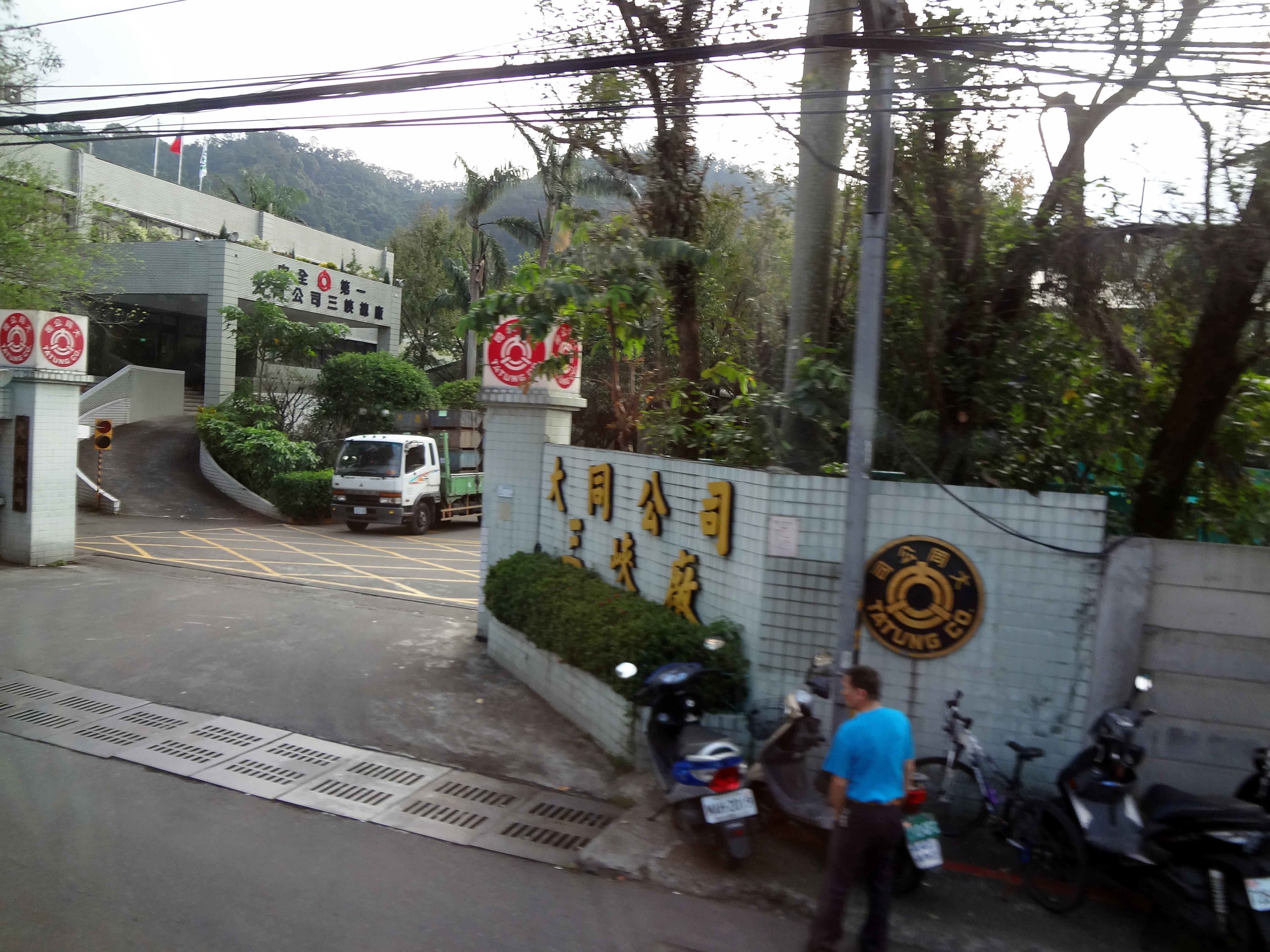 大同公司三峽廠，位於新北市三峽區溪東路352號。本照片係於遊覽車上拍攝。